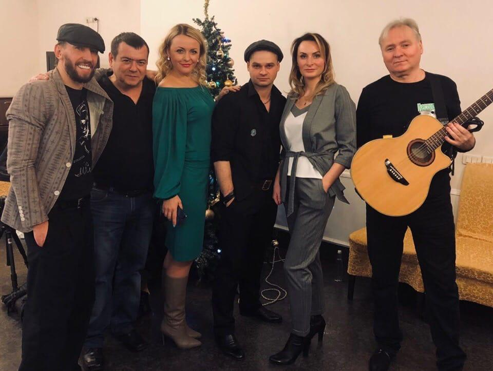 Татьяна Шмелева-Зорина (концертный директор), Юлия Ариничева (руководитель ВИА «Пламя») и группа «ЛЕСОПОВАЛ».